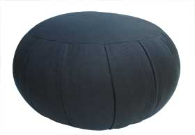 Zafu.jpg